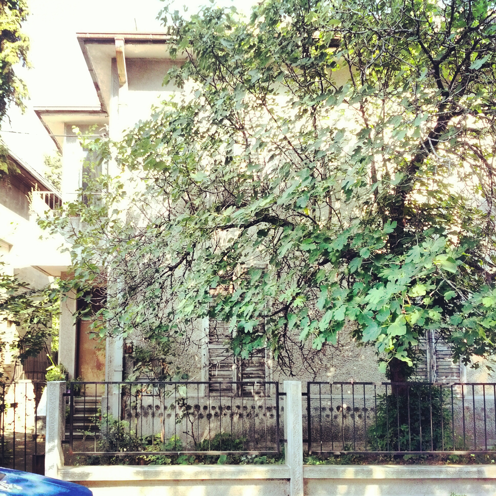 Меморијални музеј Надежде и Растка Петровића 2.1 (Android).